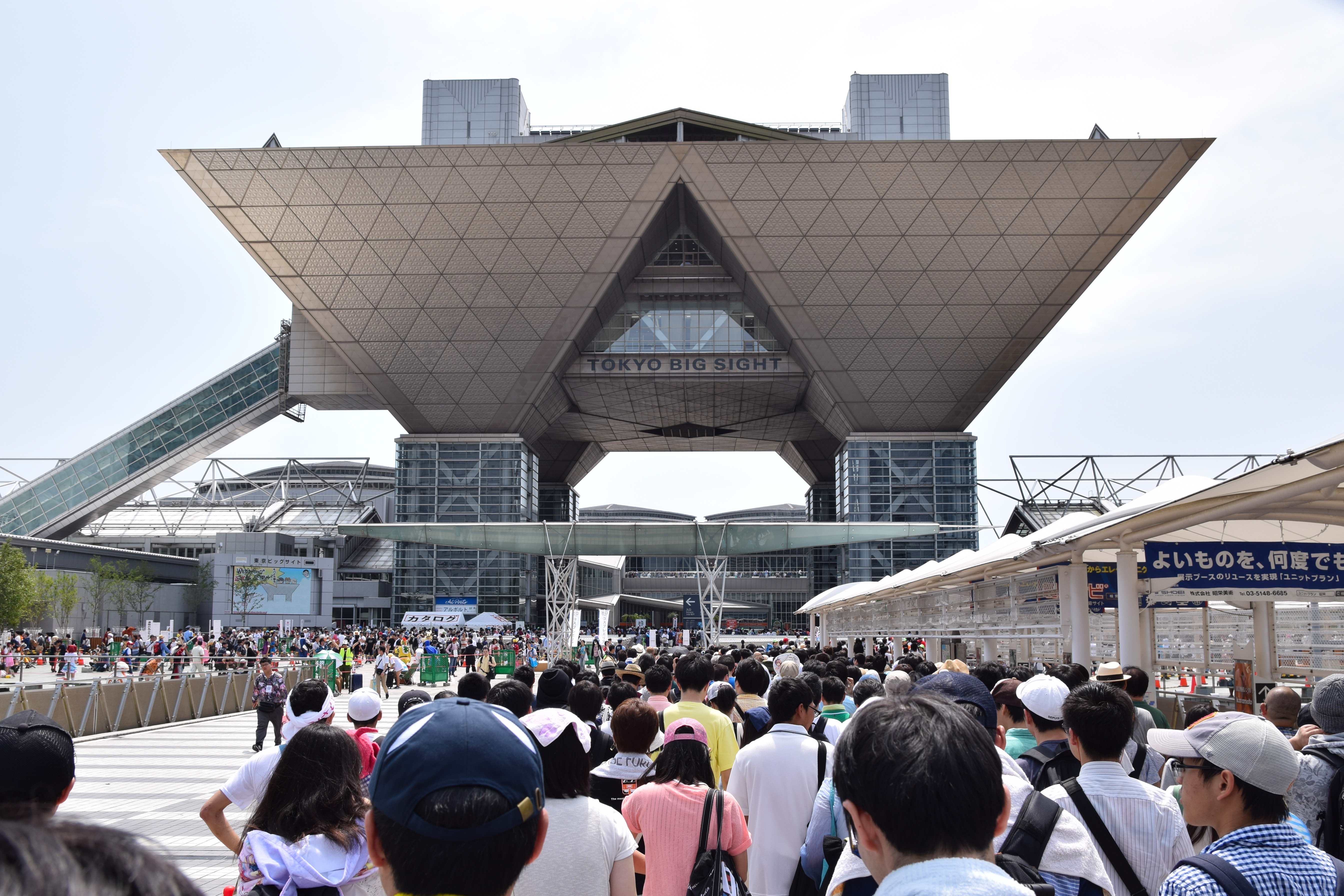 Comiket BIG SITE